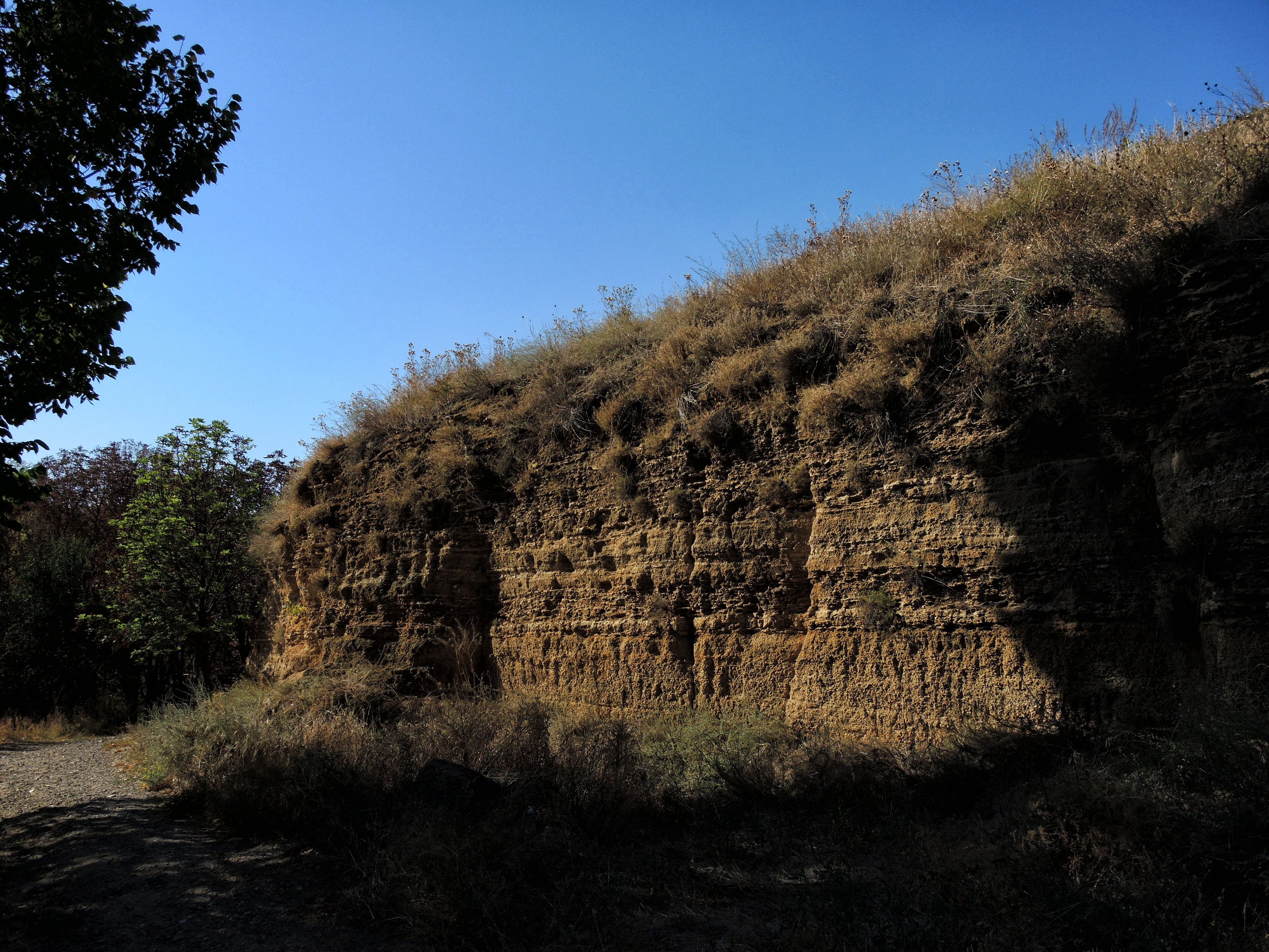 Кобяково городище: Аксайская, Аксайский район, Ростовская область